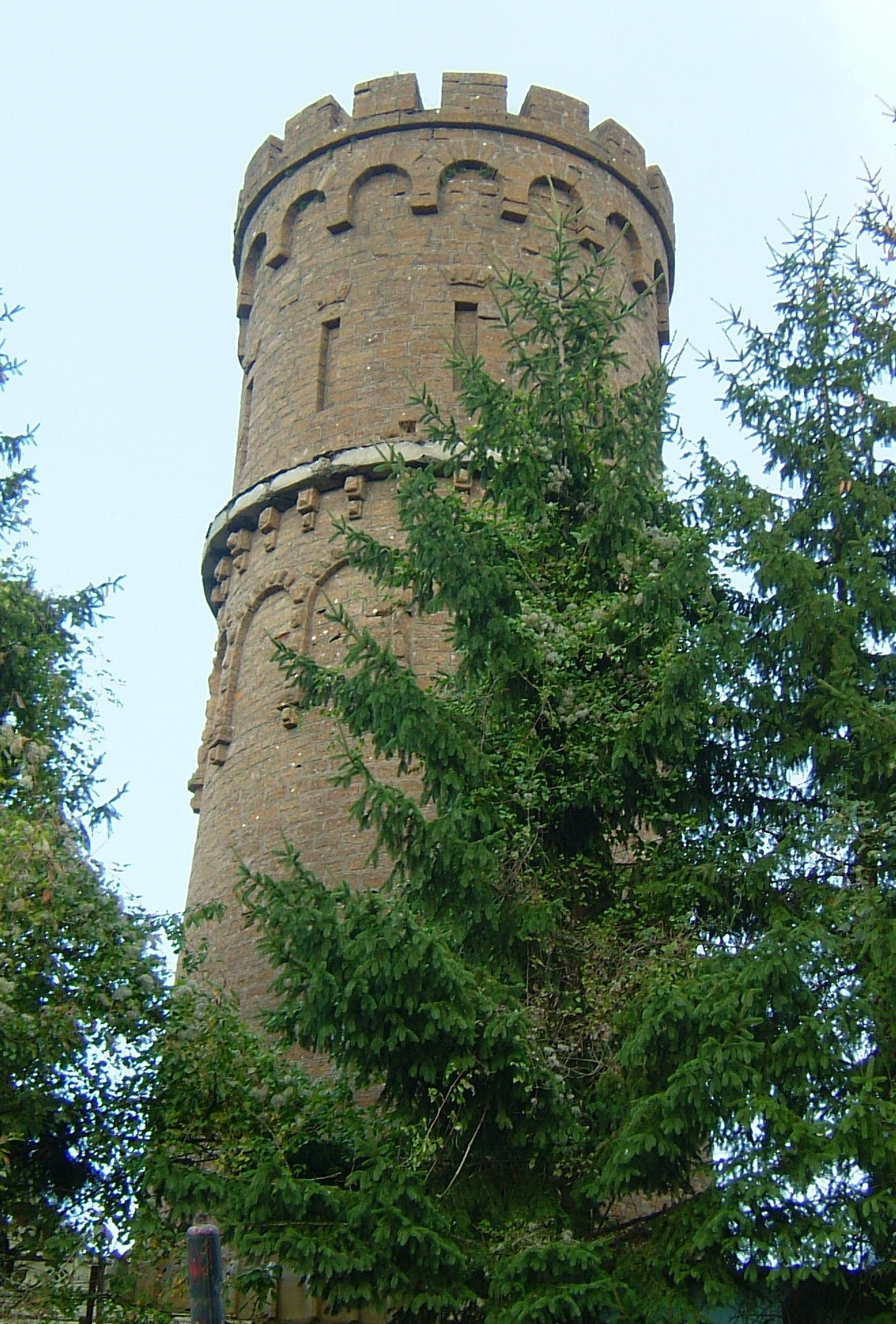 Waassertuerm um Perchesbierg bei Téiteng